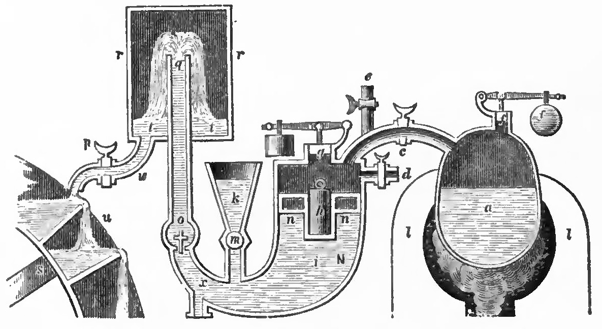 ドニ・パパンによる2回目の蒸気機関(1707)